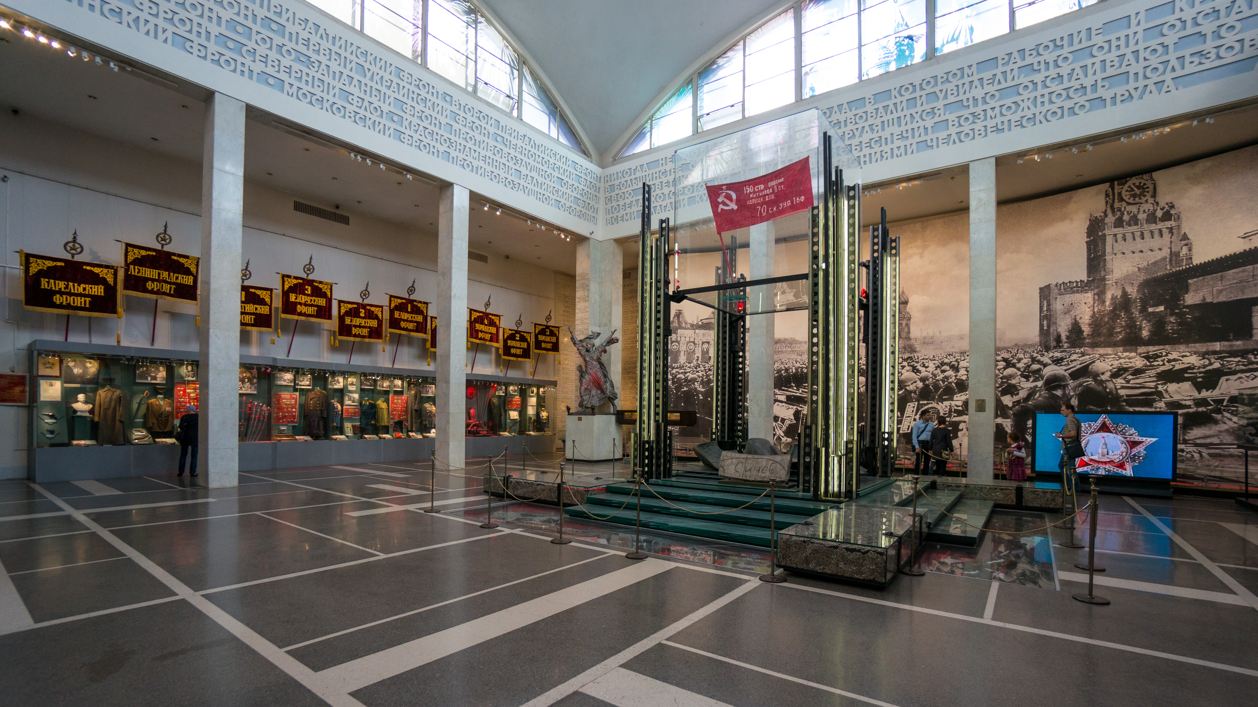 Знамя Победы в Центральном музее Вооруженных Сил